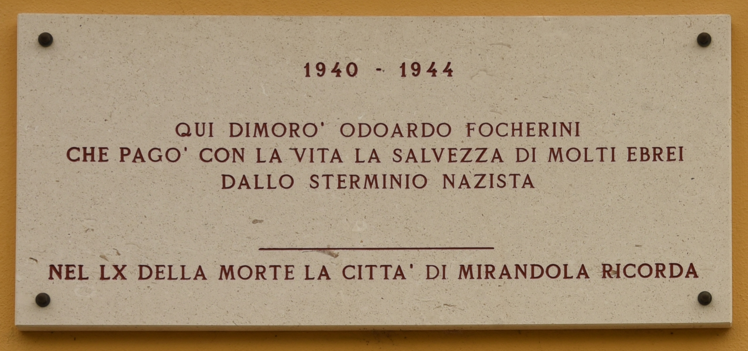 Gedenktafel für Odoardo Focherini